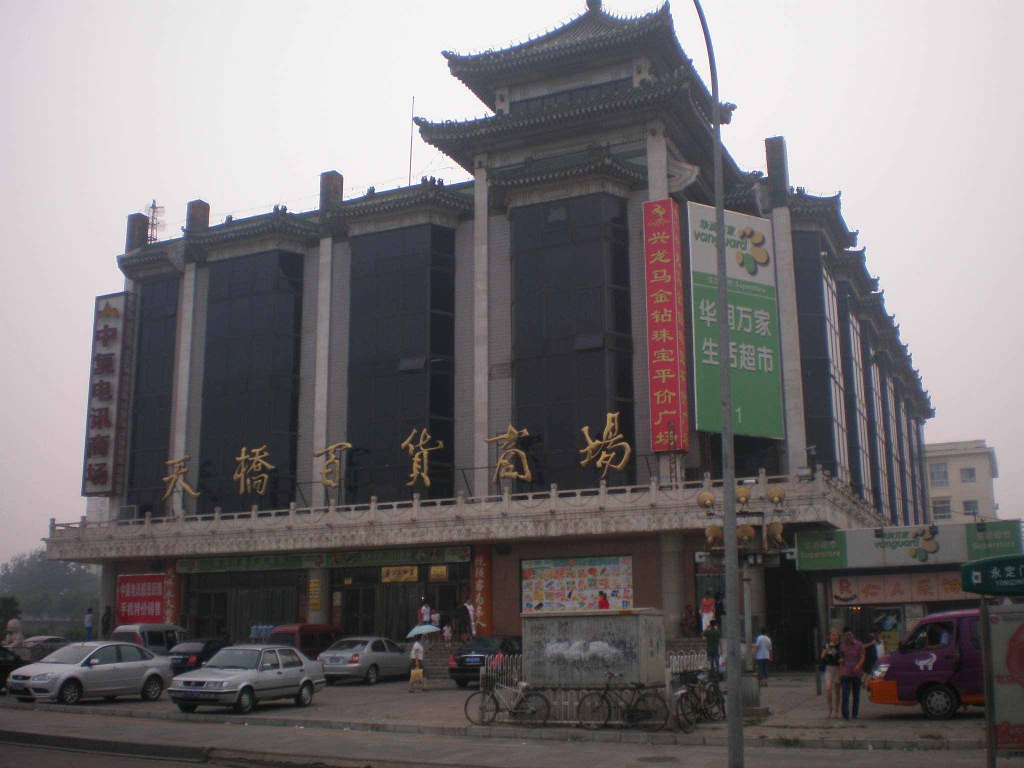 中文（中国大陆）: 北京天桥百货商场